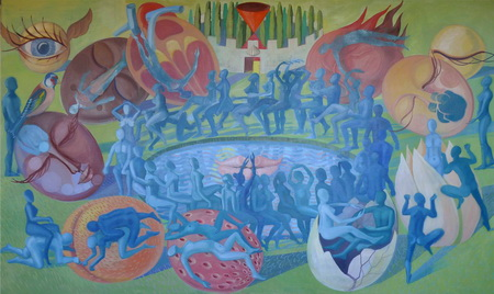 Dílo Miluše Poupětové